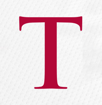 Transylvania sports logo